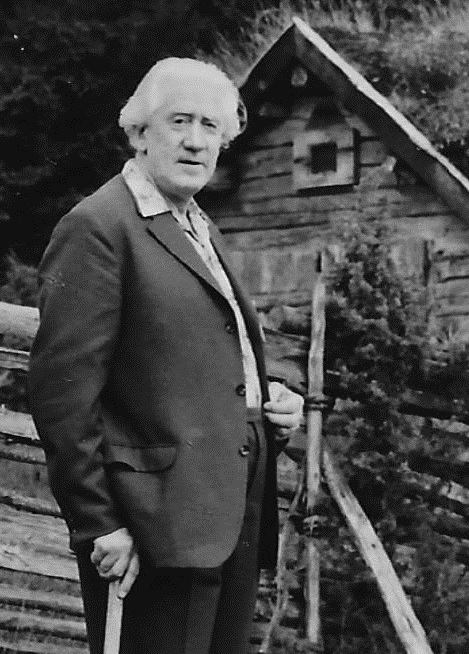 I vallkörargatan, Vättehult